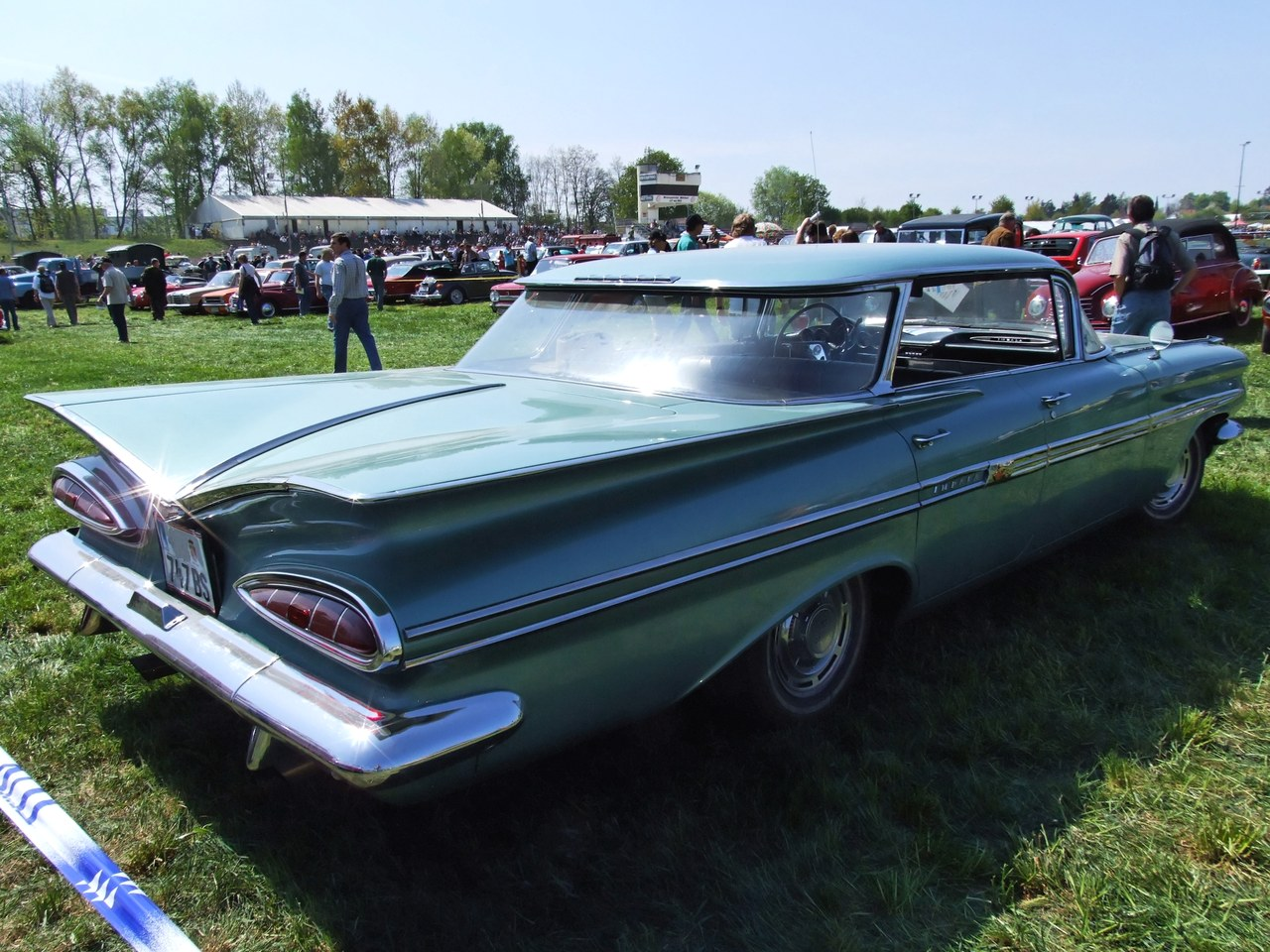 Quelle: selbst fotografiert, 04/2007 Fotograf: Späth Chr.